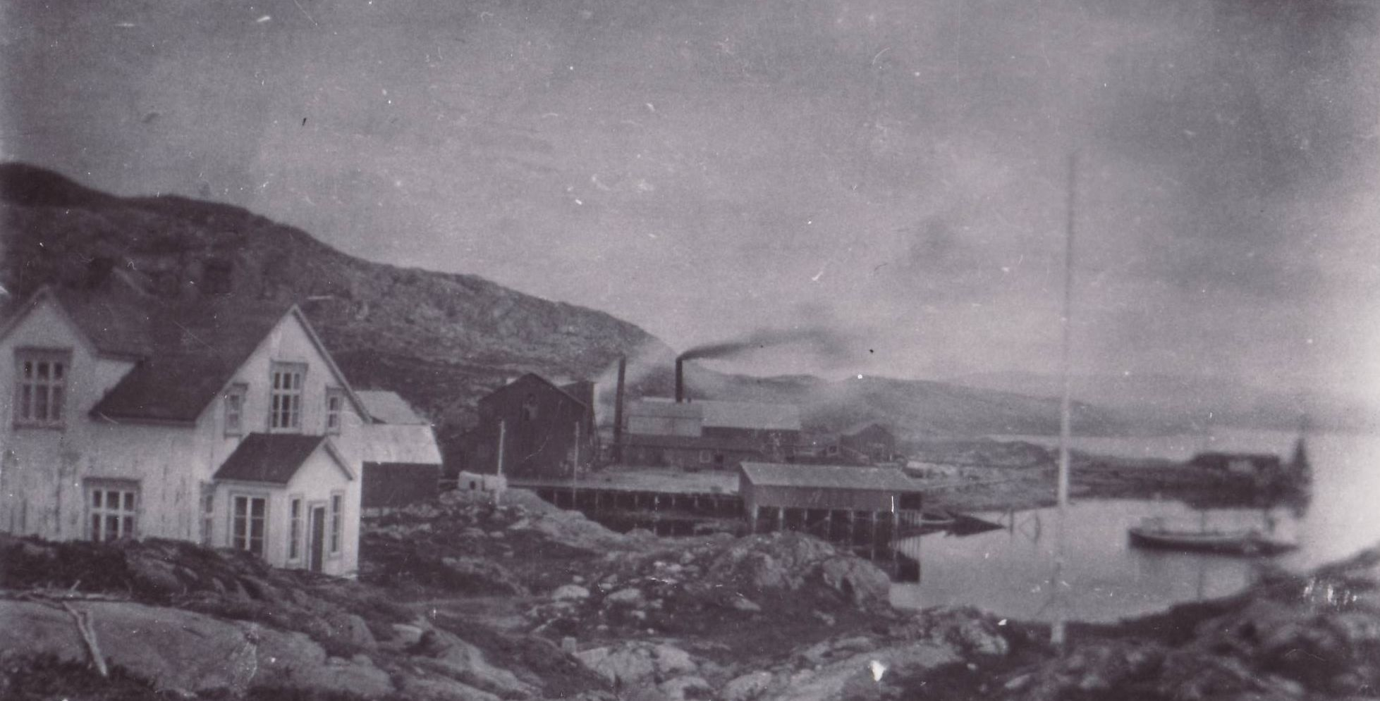 Hestnes Whaling station in Hitra, Sør-Trøndelag, Norway